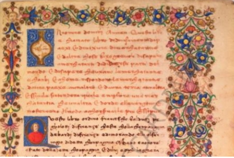 Francesco Balducci Pegolotti, Pratica della mercatura (1472 ms.) f. 1r